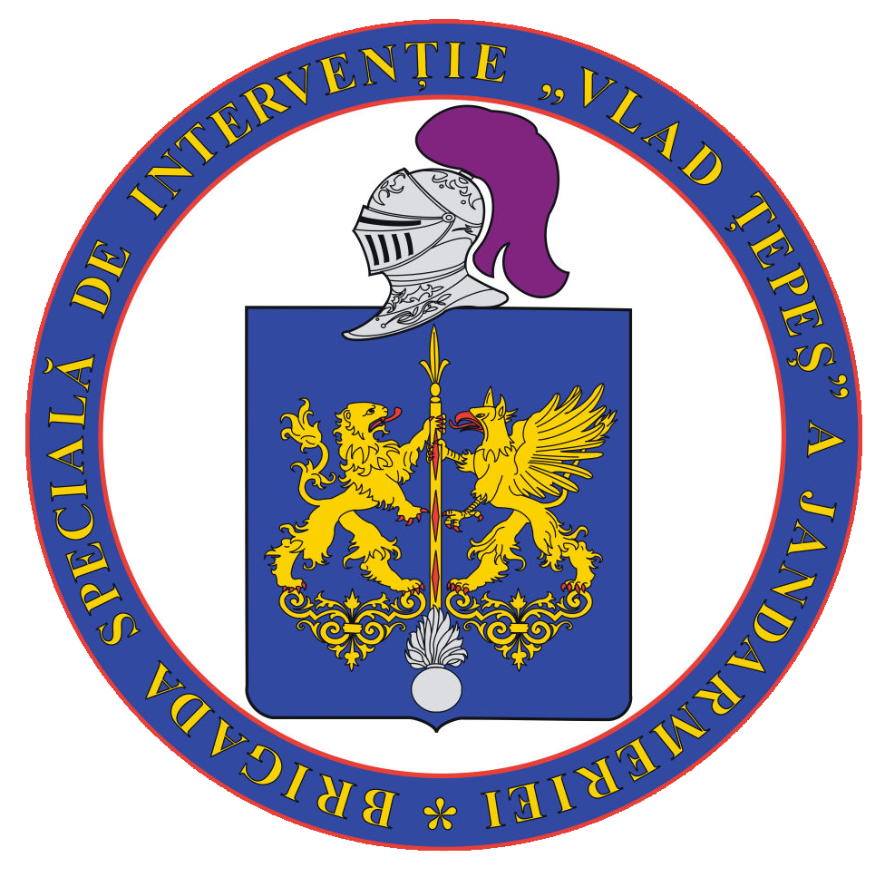 Stema unei unitati a Jandarmeriei Romane